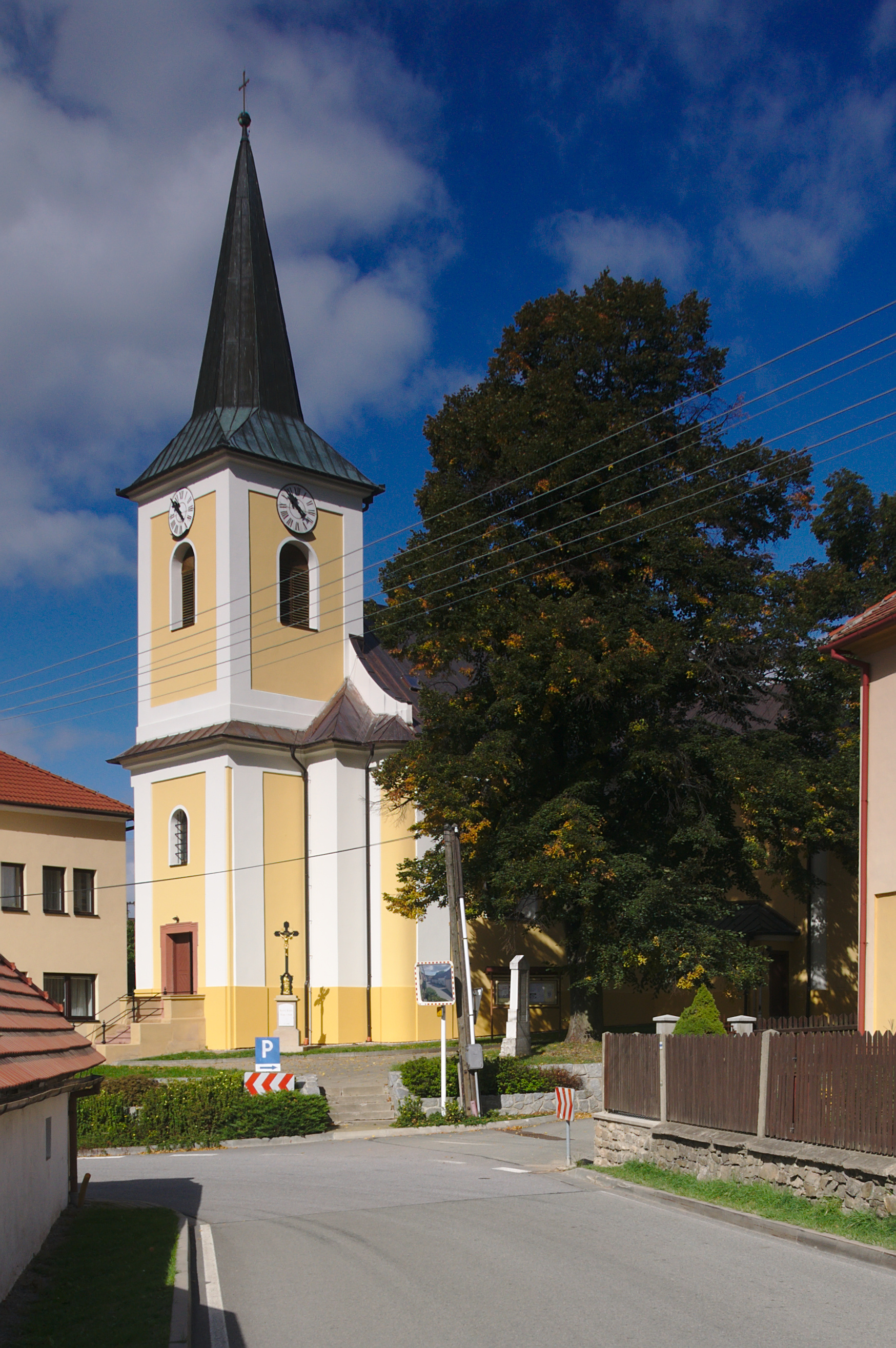 Kostel svatého Mikuláše, Bedřichov, okres Blansko